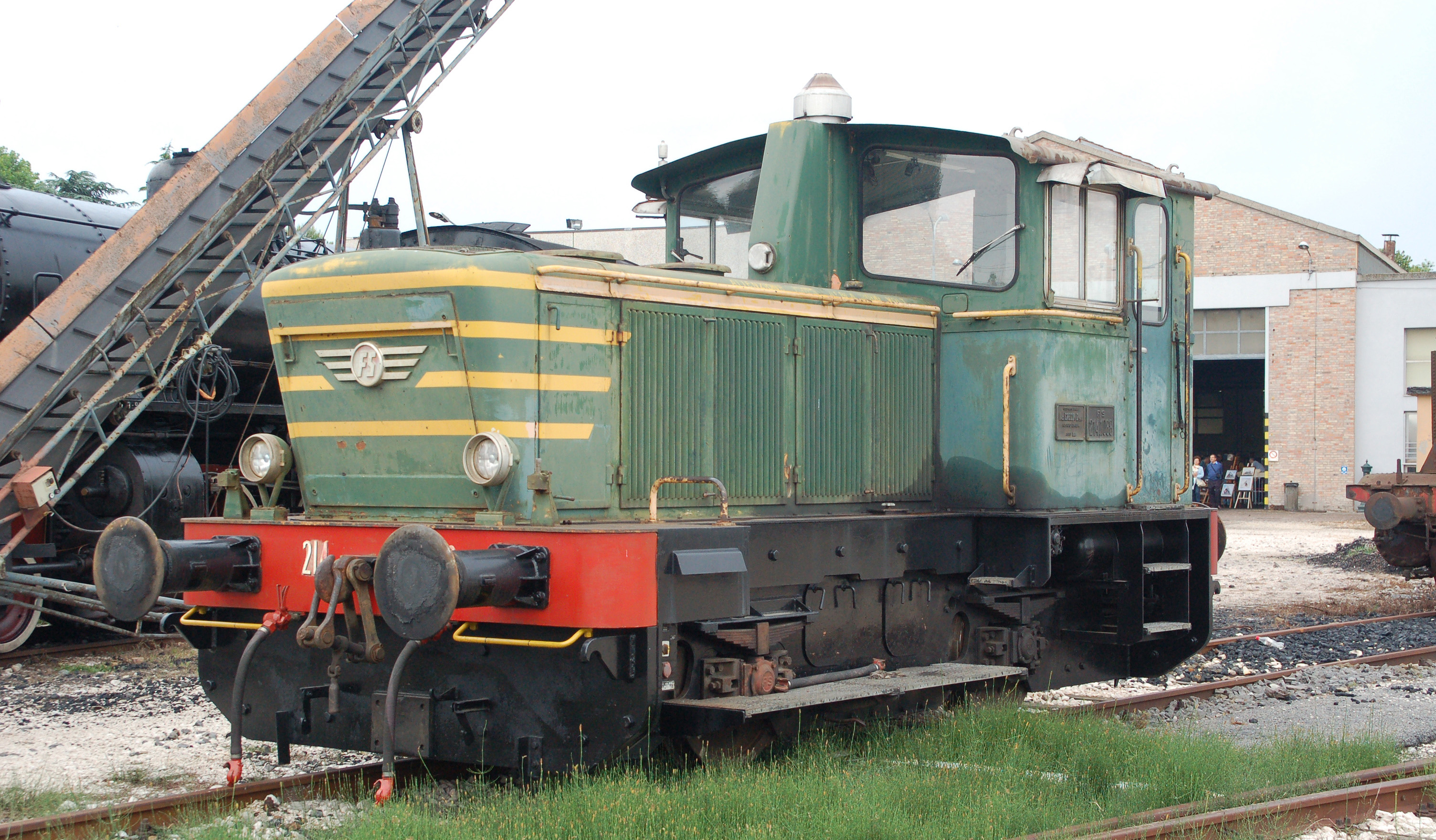 Locomotiva FS D 214 1068 al deposito di Rimini il 07/06/2008